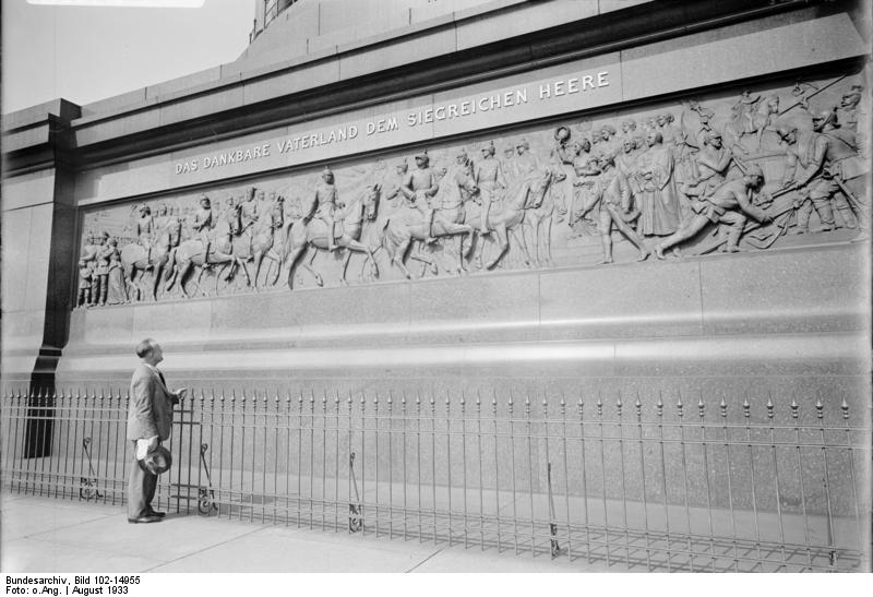 60 jähriges Bestehen der Siegessäule auf dem Königsplatz in Berlin! Riesen Reliefs, welche sich rings um den Sockel der Siegessäule herumziehen.